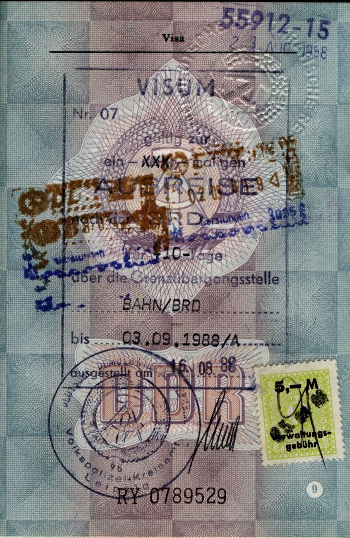 Виза ГДР для посещения ФРГ на 10 дней